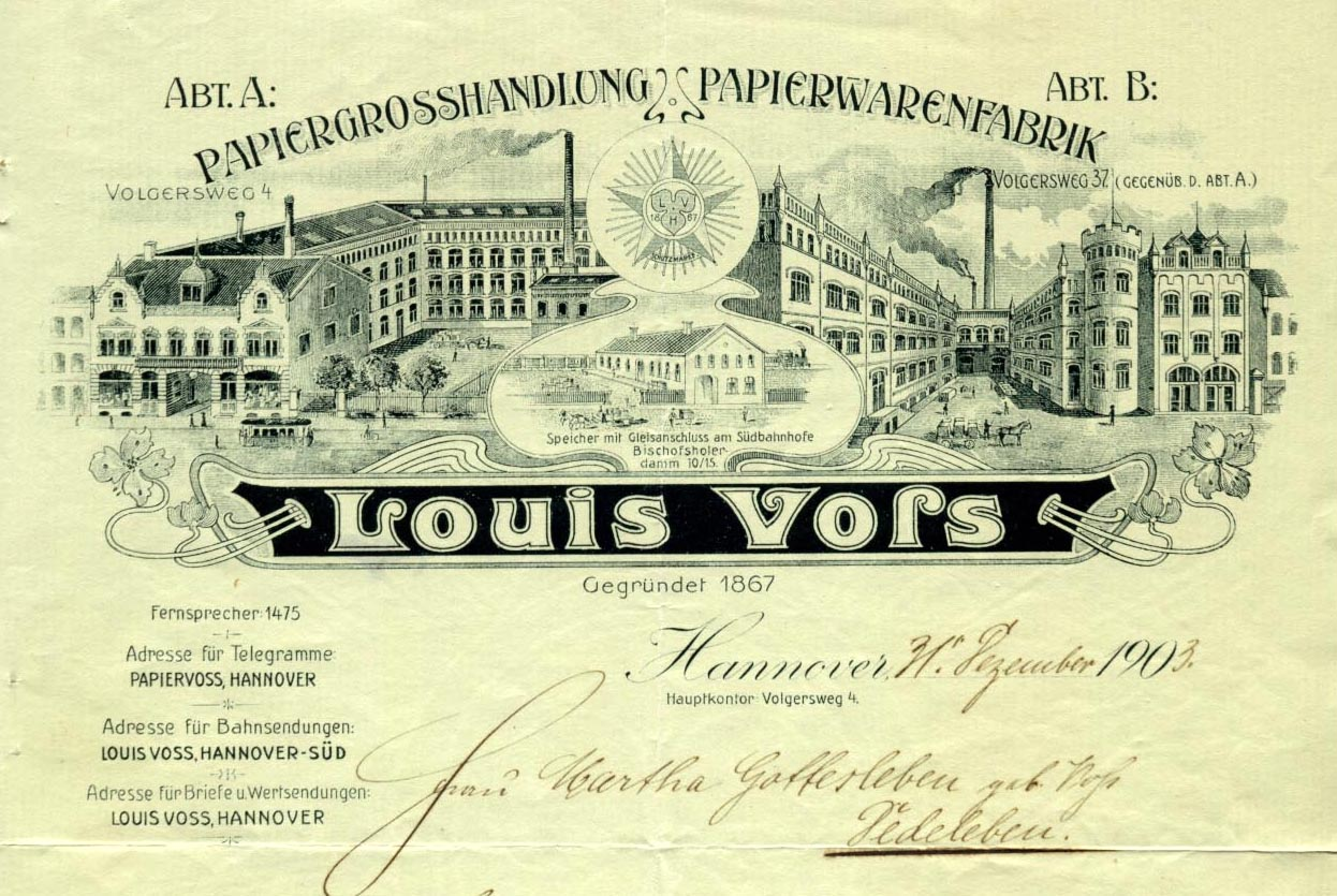 Am letzten Tag des Jahres 1903, am 31. Dezember handschriftlich datierter Briefkopf eines Rechnungsbogens der 1867 durch Louis Voss gegründeten Papierwarenhandlung und Papierwarenfabrik mit Abbildungen der beiden Büro- und Fabrikgebäude unter den - damaligen - Adressen. Vor dem Hauptkontor am Volgersweg 4 ist eine Straßenbahn abgebildet, die - gegenüberliegende Abteilung B soll sich am Volgersweg 37 befunden haben. Dazwischen - unterhalb der abgebildeten Schutzmarke mit dem hannoverschen Kleeblatt - findet sich der Stahlstich des Speicher-Gebäudes "mit Gleisanschluss am Südbahnhofe" mit der Adresse Bischofsholer Damm 10-15. Unter dem mit Elementen des Jugendstils verzierten Schriftzuges von Louis Voss findet sich die Adressatin: „Frau Martha Gottesleben, geb. Voß Dedeleben“ Das Unternehmen Louis Voss blieb vor allem durch seine selbst hergestellten Schulhefte später unter dem Namen Papiervoss oder auch einfach "Voß" bekannt. Laut dem Informationsgeber Klaus Gottsleben (herzlichen Dank für das Digitalisat!) hieß Martha mit Nachnamen jedoch Gottsleben ...